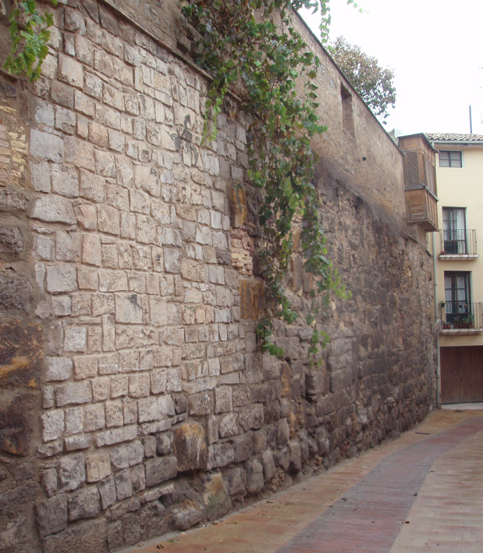 Restos de la Muralla de Tudela en calle de Granados, en 2008